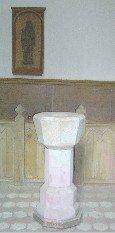 Steintaufe. Dorfkirche Grüssow, Landkreis Mecklenburgische Seenplatte